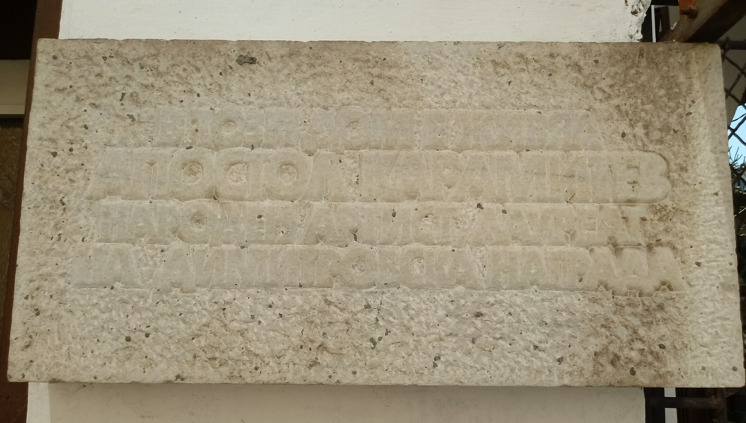 Apostol Karamitev memorial plaque, Morska Str., Burgas